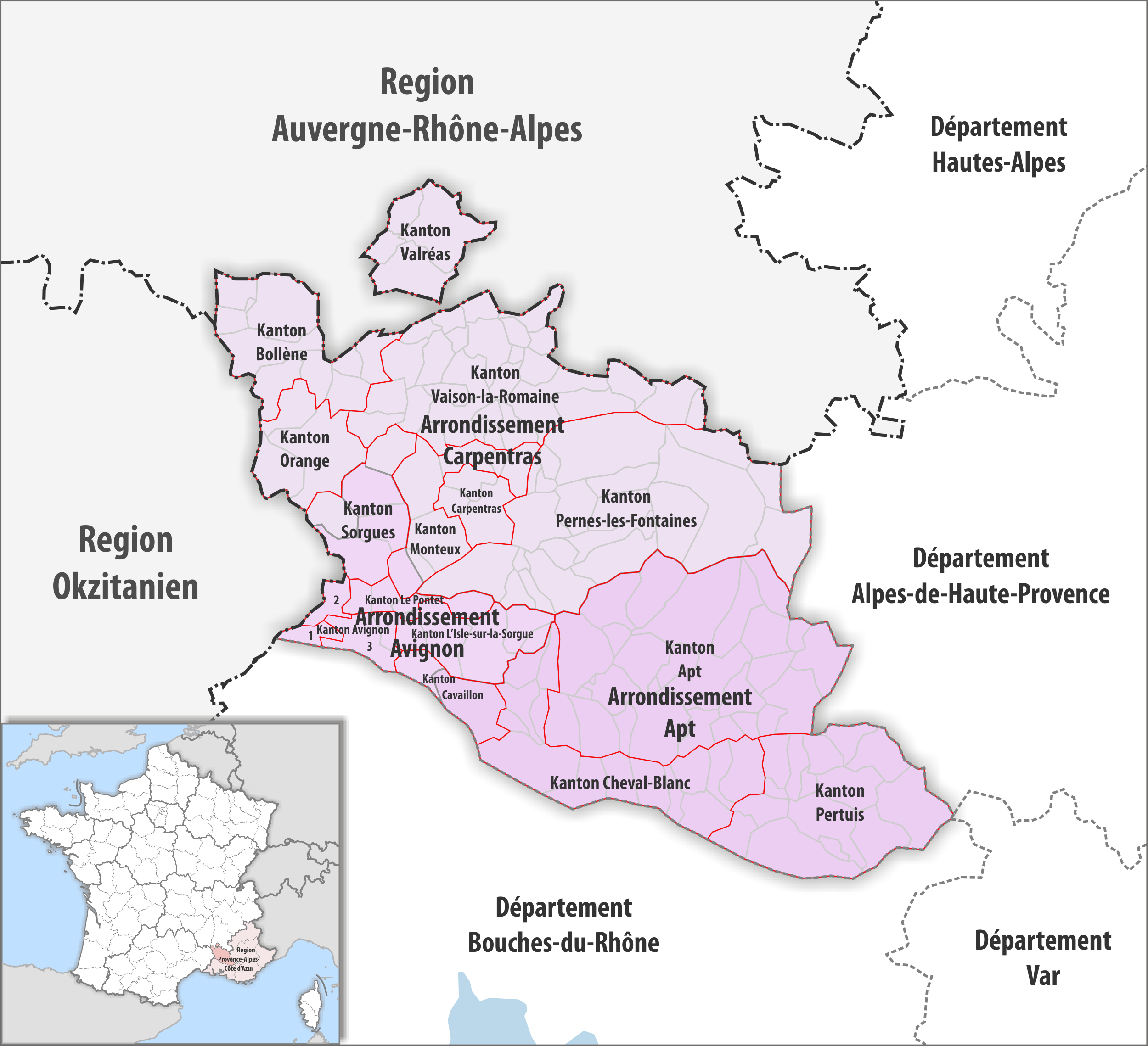 Gemeinden, Kantone und Arrondissemente im Departement Vaucluse